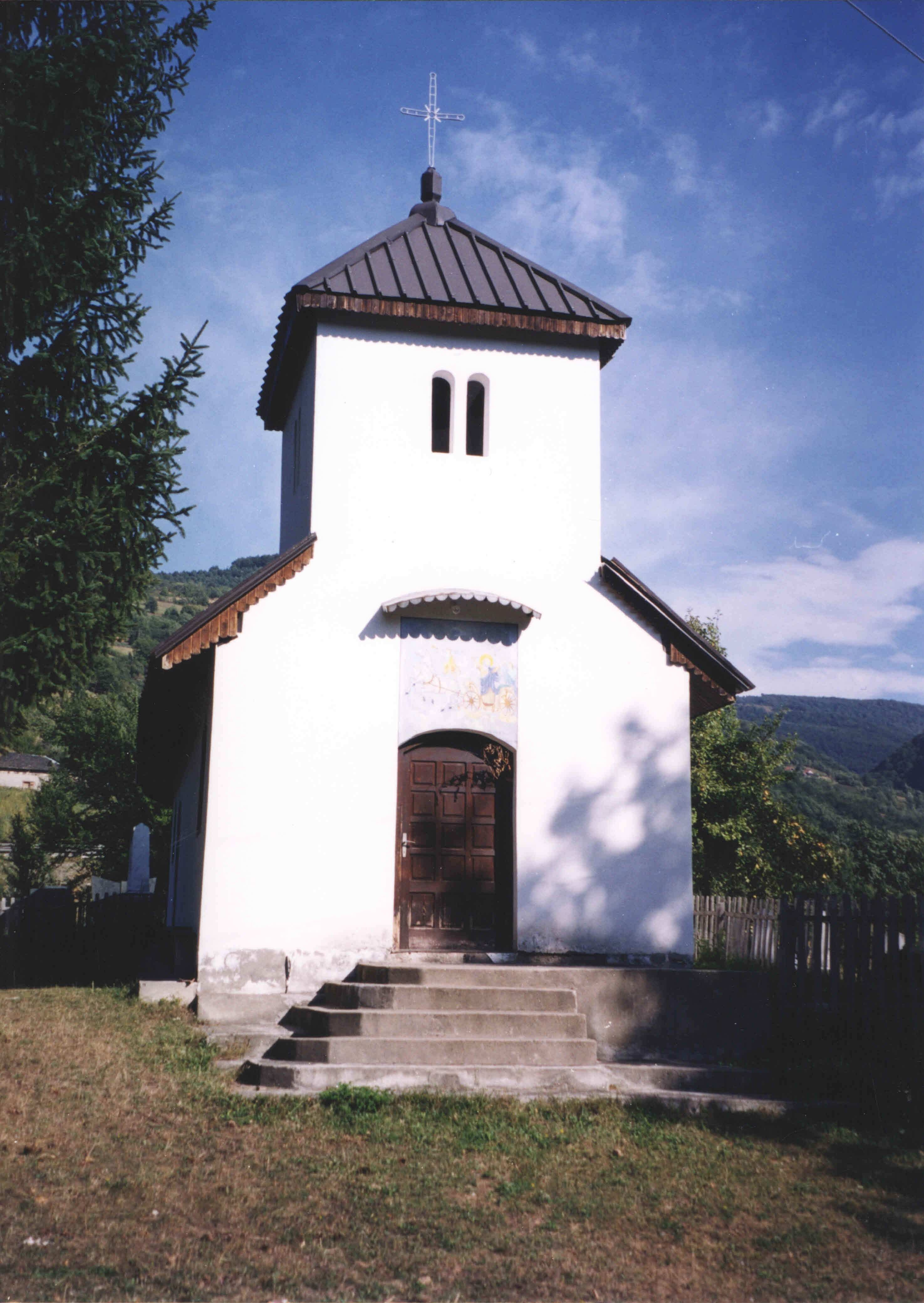 Crkva Sv. Ilije u Kumanici